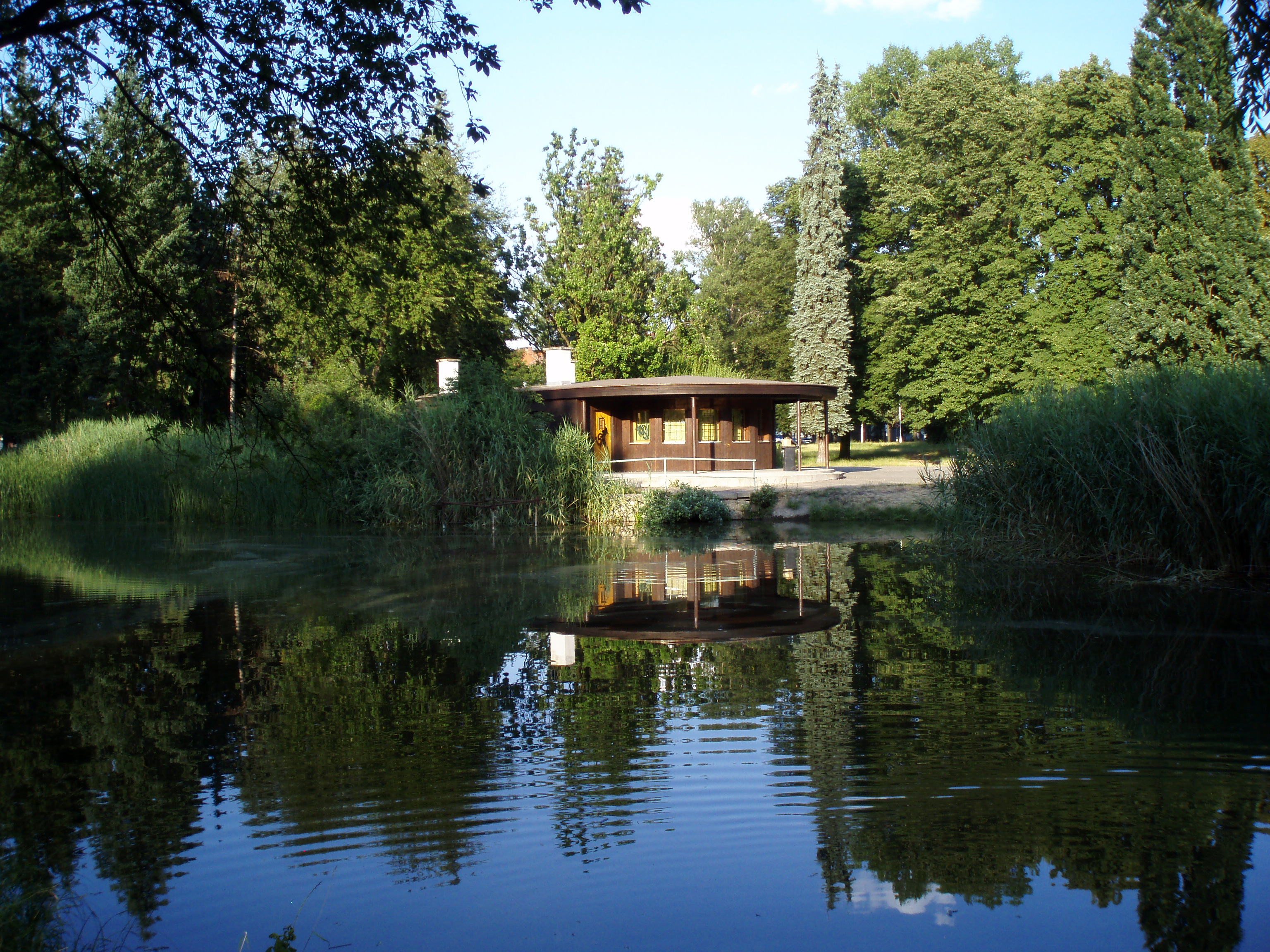 Šimkovy sady (Hradec Králové)